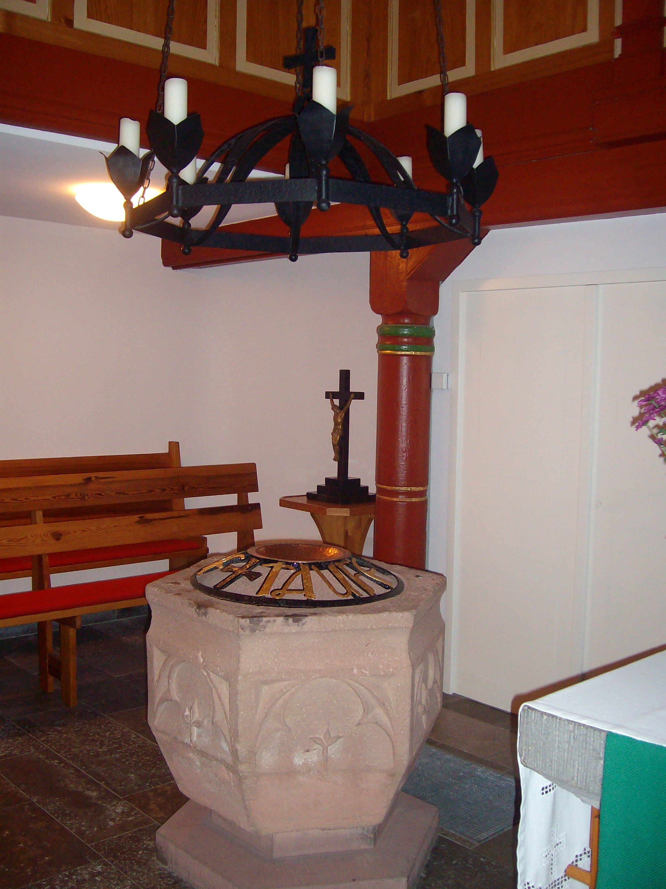 Taufbecken der Evangelischen Kirche Lauter, Laubach, Landkreis Gießen, Hessen, Deutschland